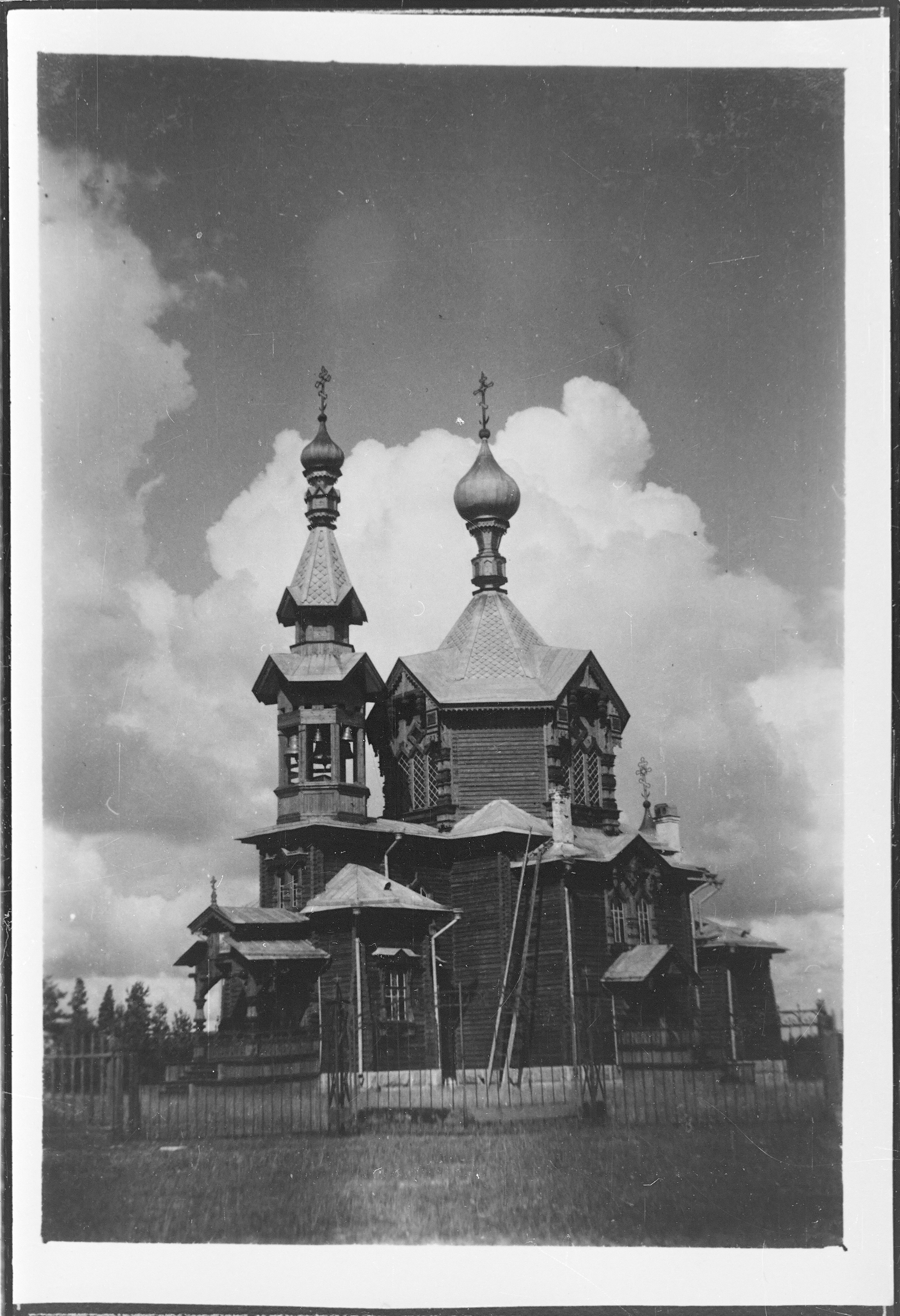 Mustamäen ortodoksinen Kristuksen kirkastumisen kirkko Sykiälän kylässä Kanneljärvellä.